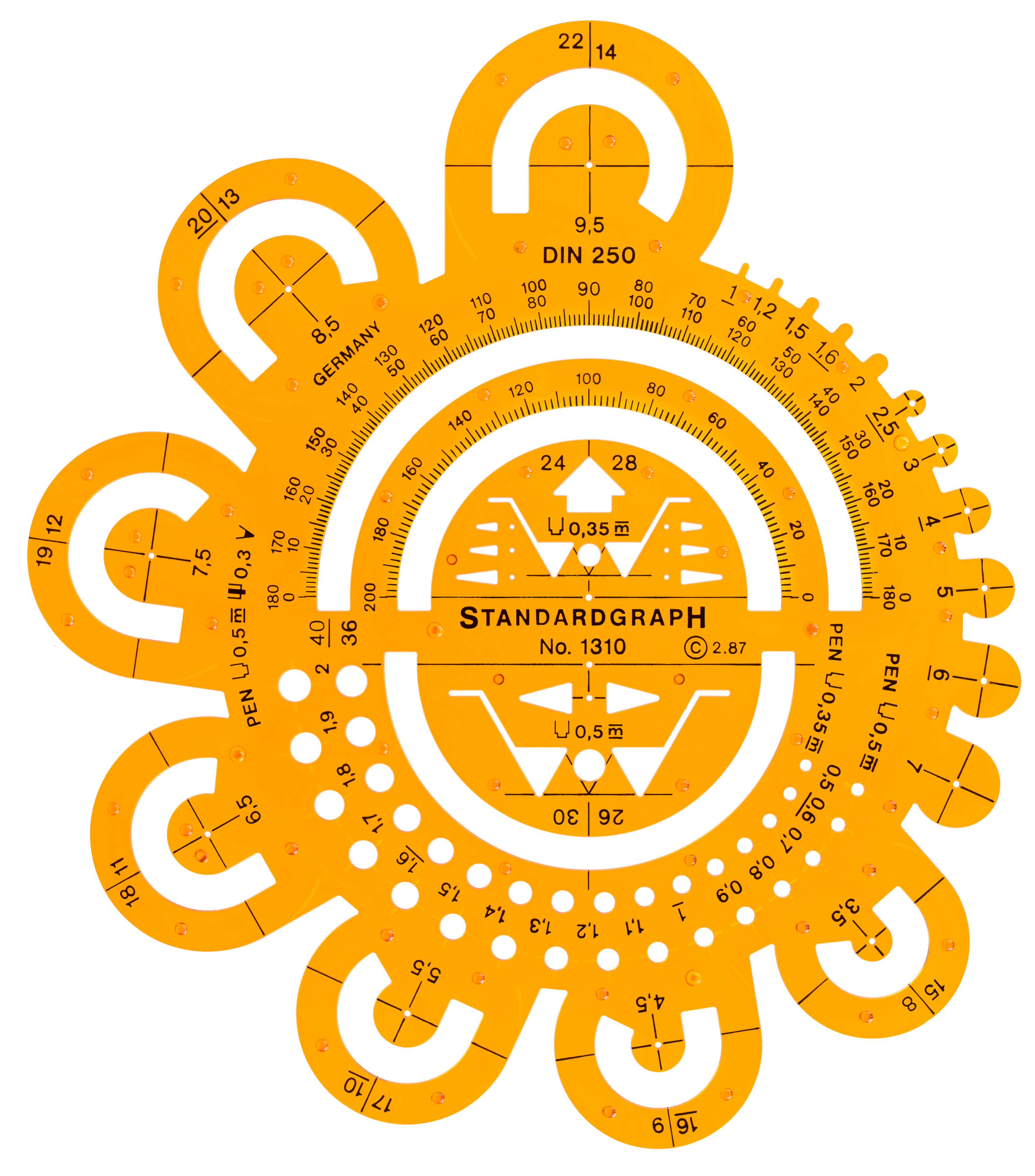 Standardgraph 1310 Abrundungsschablone